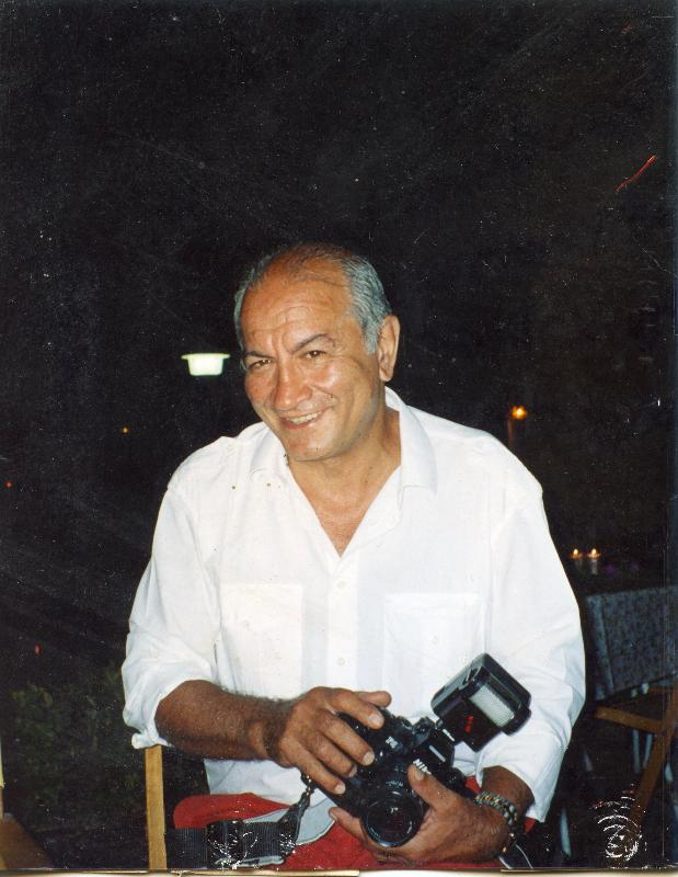 Valter Ferrara a Ischia